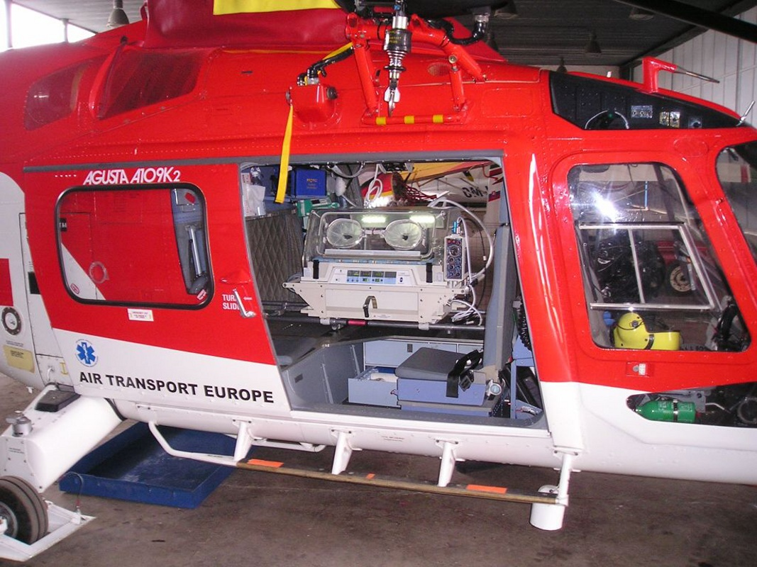 Inkubátor na prevoz detí v Ahuste A109K2